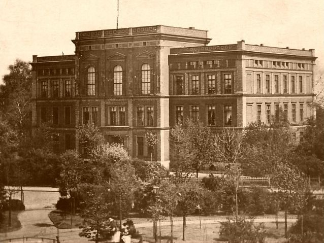 II Liceum Ogólnokształcące im. Stanisława Staszica w Tarnowskich Górach - zdjęcia Lieberta z ok. 1890 r.